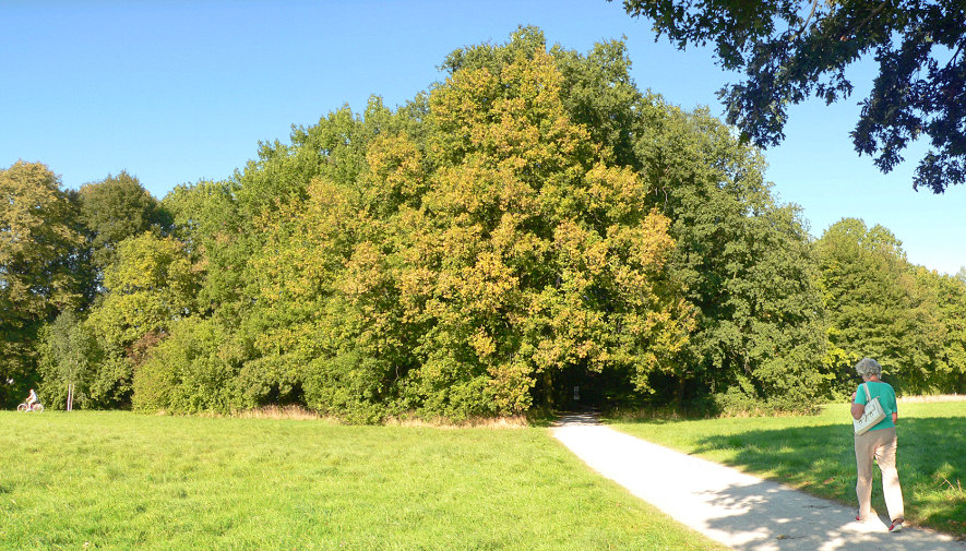 Weg und Bäume im Hermann-Löns-Park Hannover